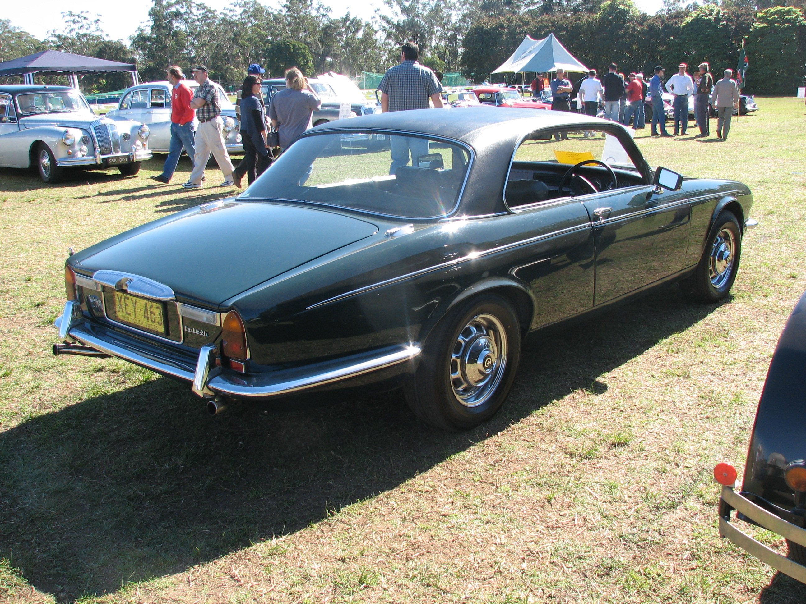 Daimler Double Six Coupe "1975 green Daimler Double-Six 5.3 coupé VIN/chassis xxxxxxxxxxxxxx25BW"